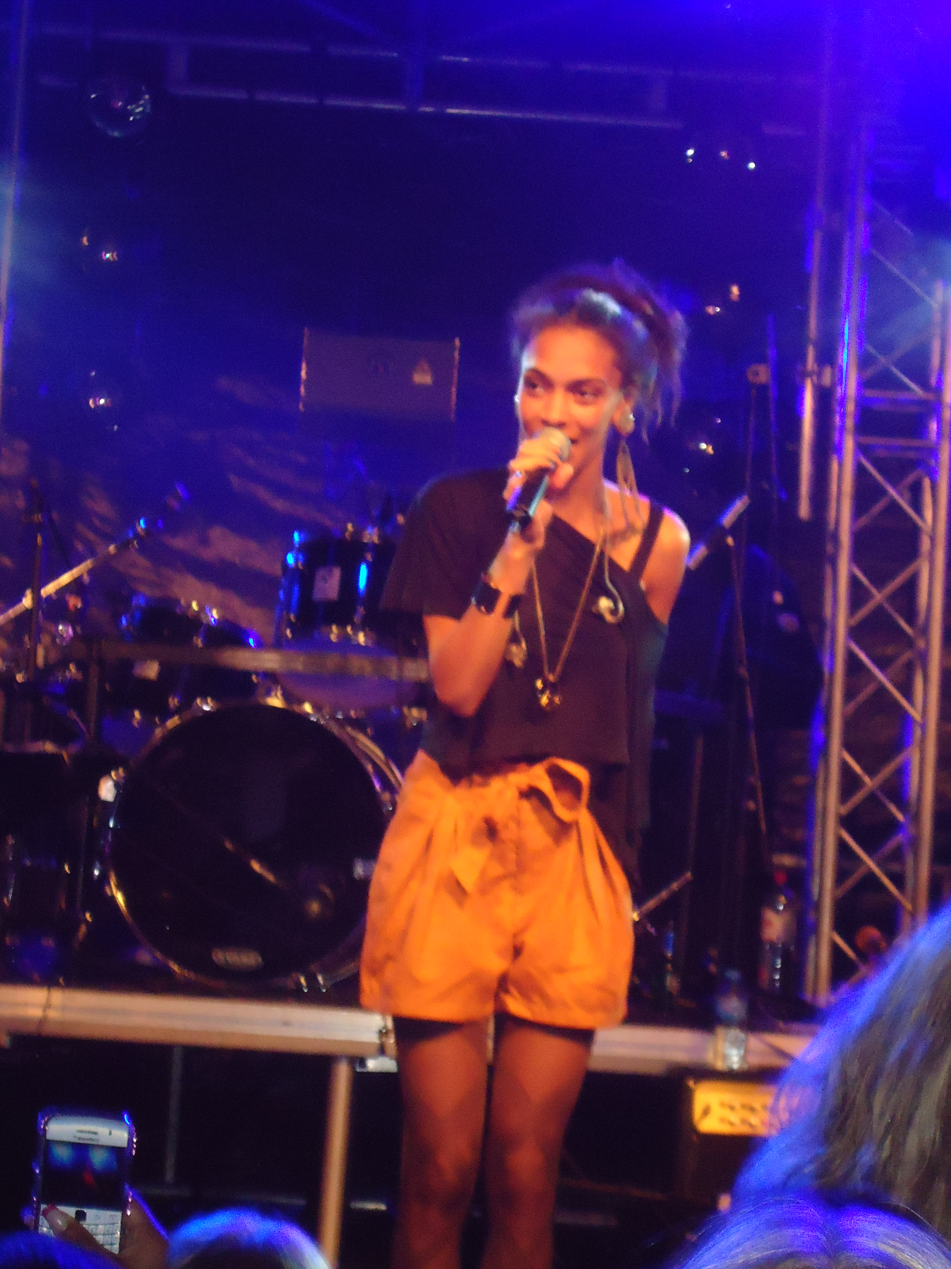 kasteeltuin concerten helmond 2011